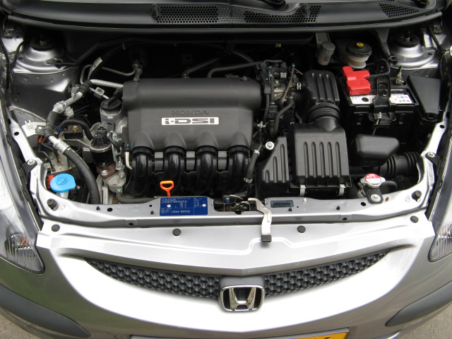 Kijkje onder de motorkap van een Honda Jazz